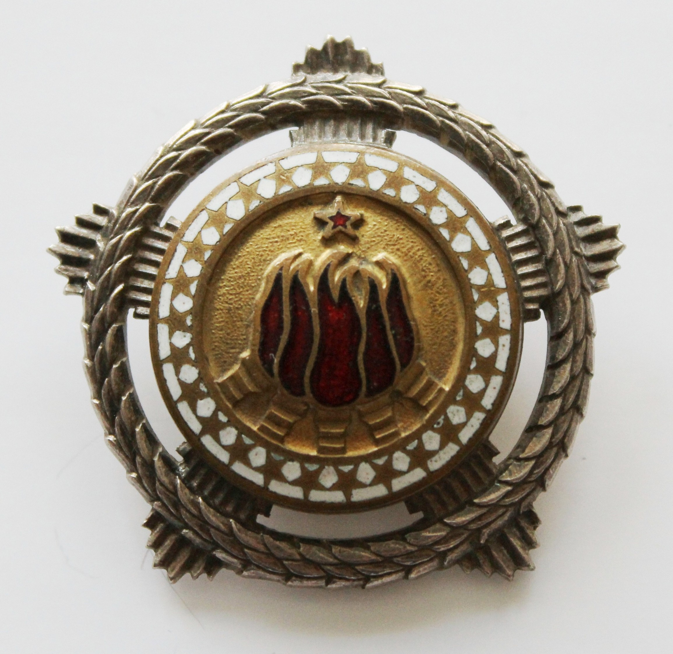 Орден братства и јединства са сребрним венцем (другог реда)